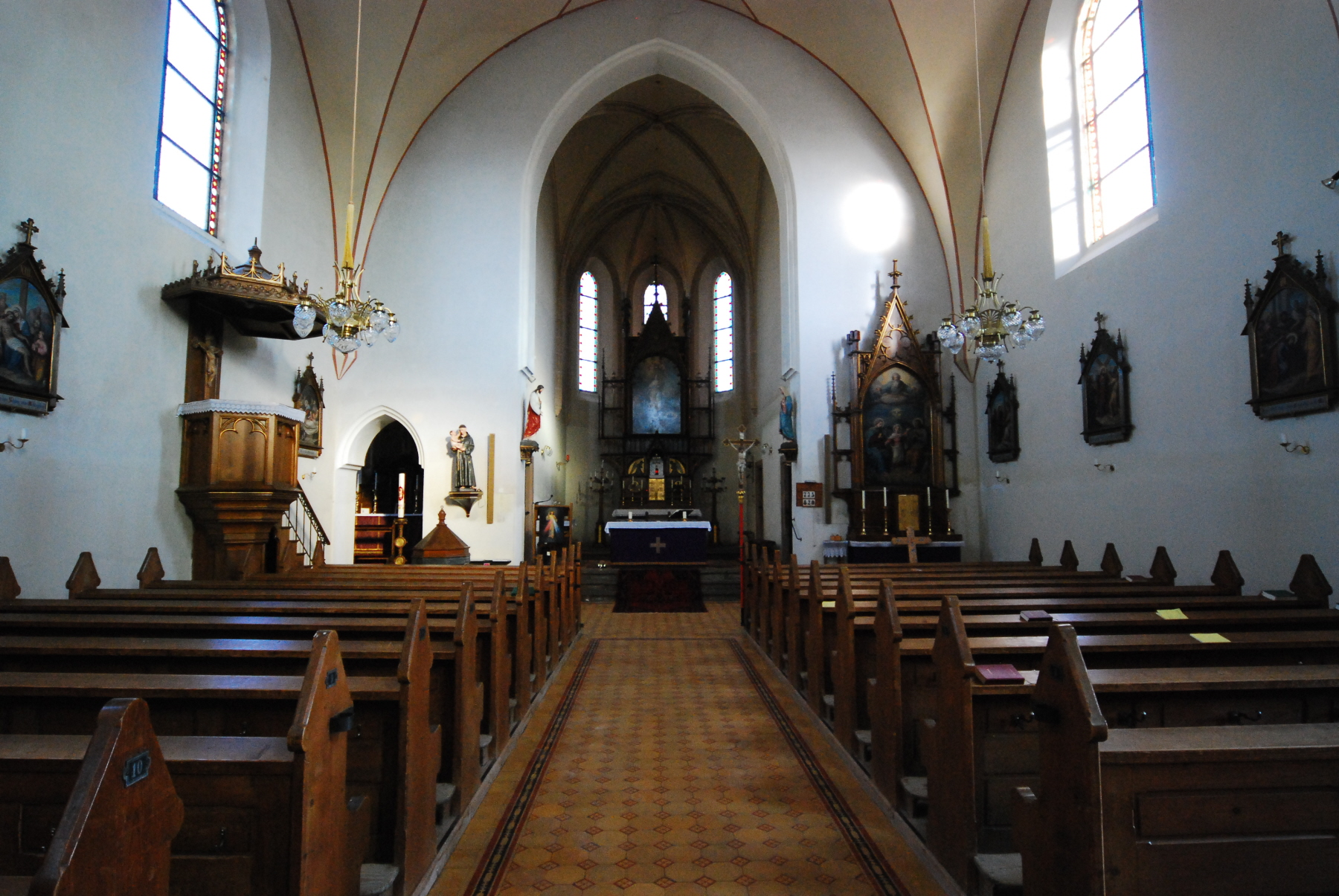 katholische Pfarrkirche heilige Afra - Altar